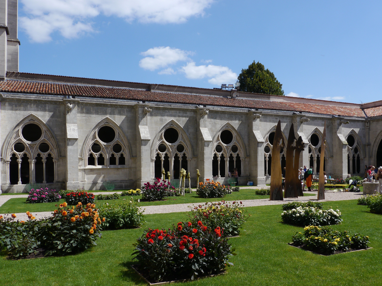 Vue sur la galerie Est du cloître gothique de la cathédrale Saint-Étienne de Toul, Lorraine, France